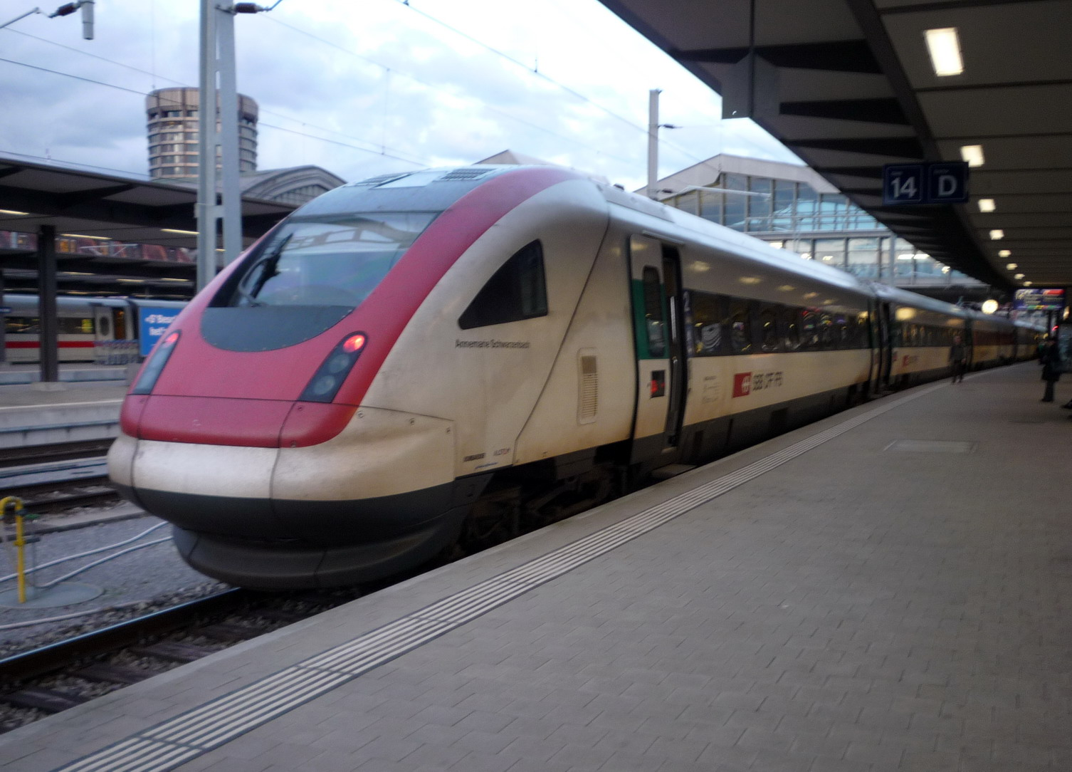 Schweizer InterCity-Neigezug (ICN) im Bahnhof Basel SBB